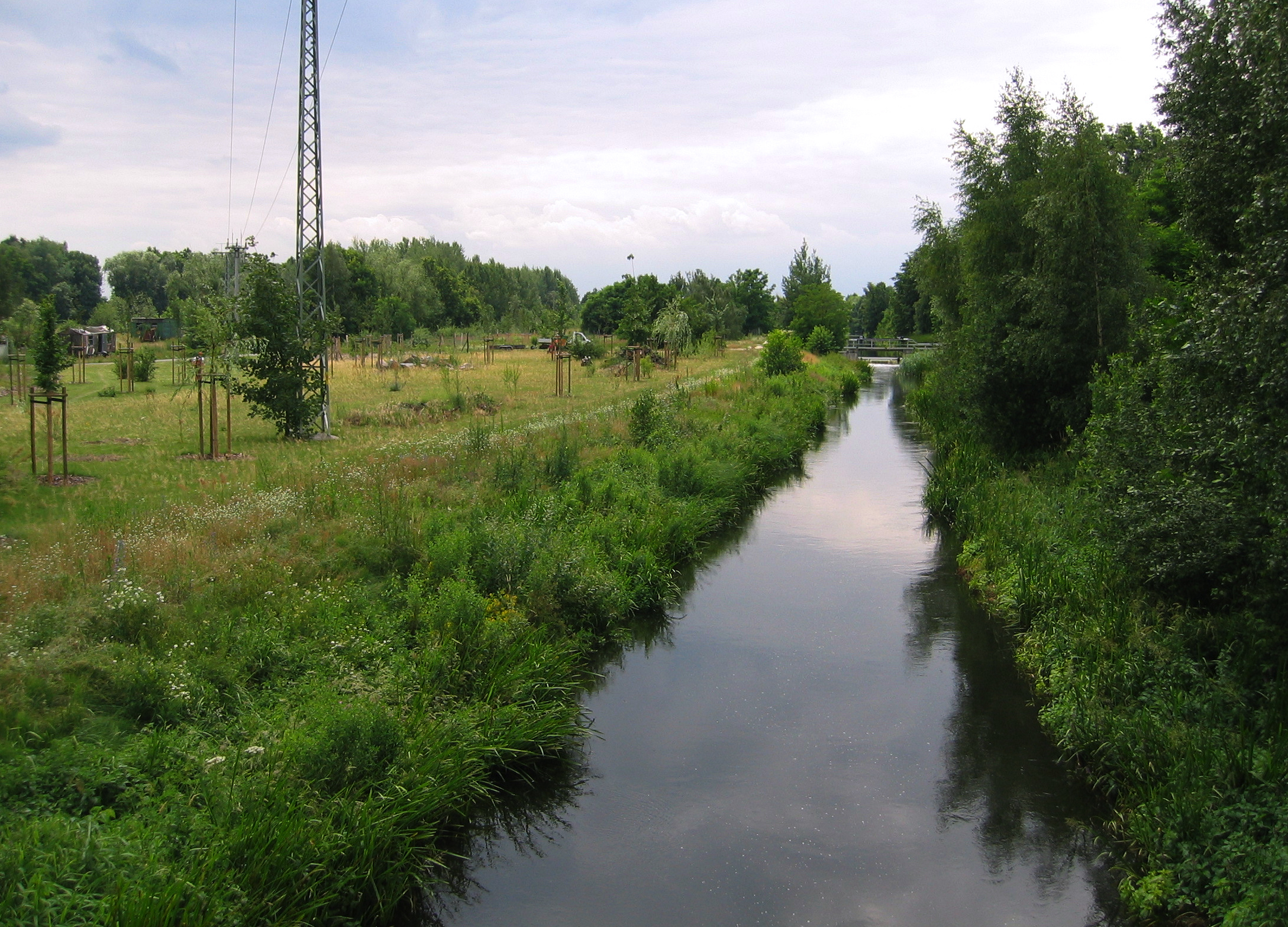 Der neue Hammergraben am Ortseingang von Lakoma, Cottbus, Deutschland. Blick nach Süden.